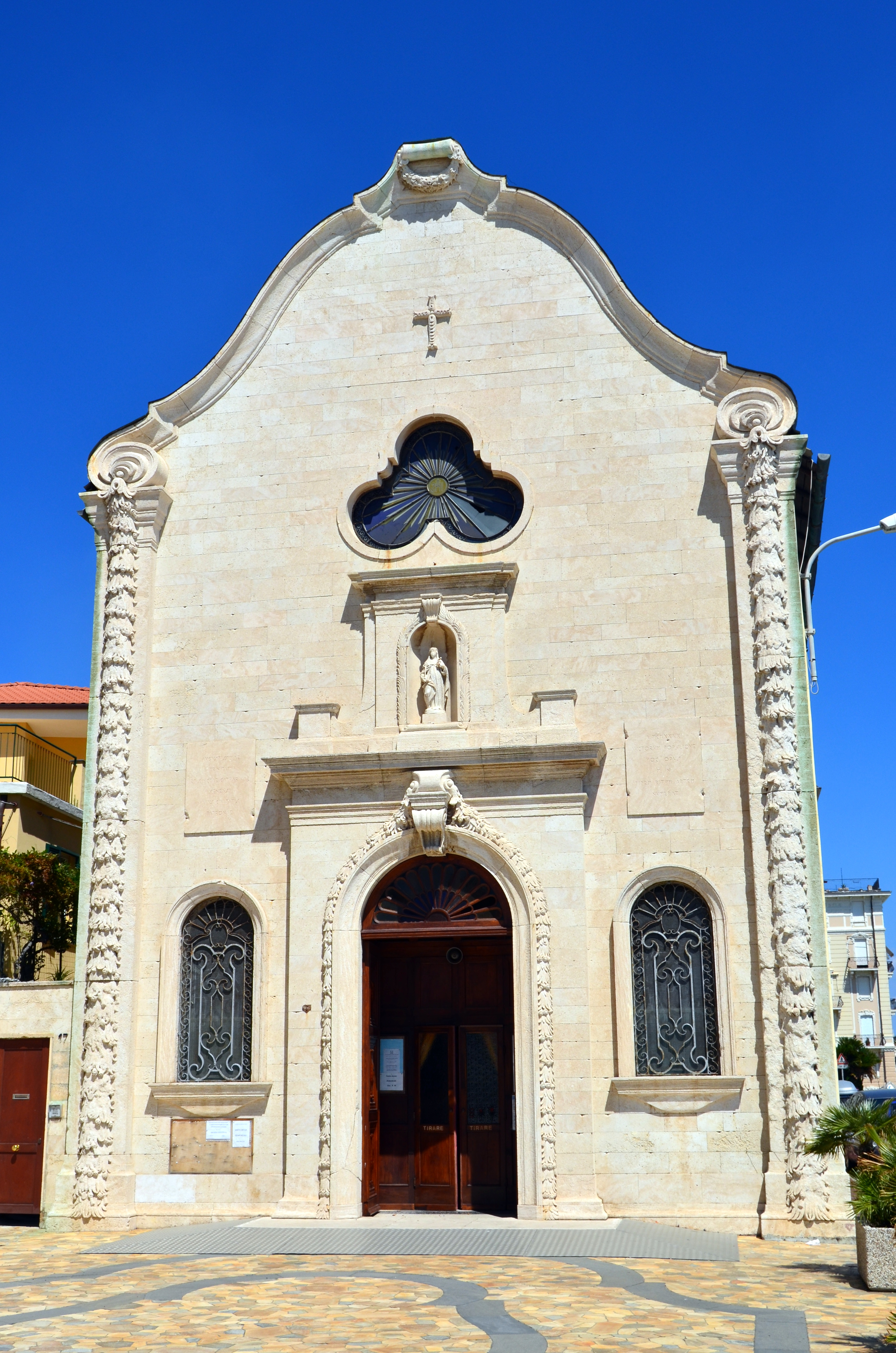 Il santuario di Santa Caterina, Varazze, Liguria, Italia